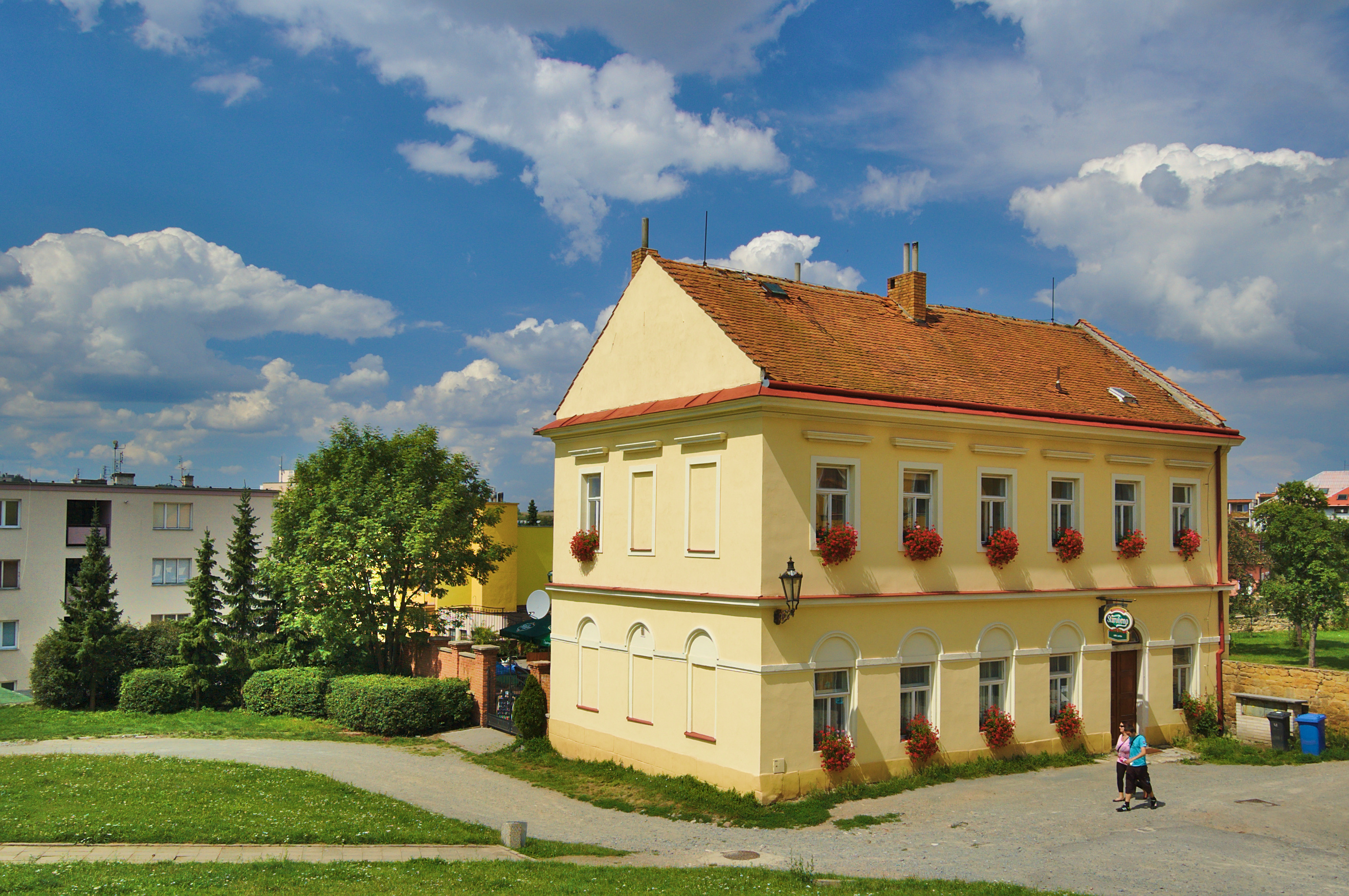 Židovský dům, čp. 349, U Koupadel, Boskovice, okres Blansko